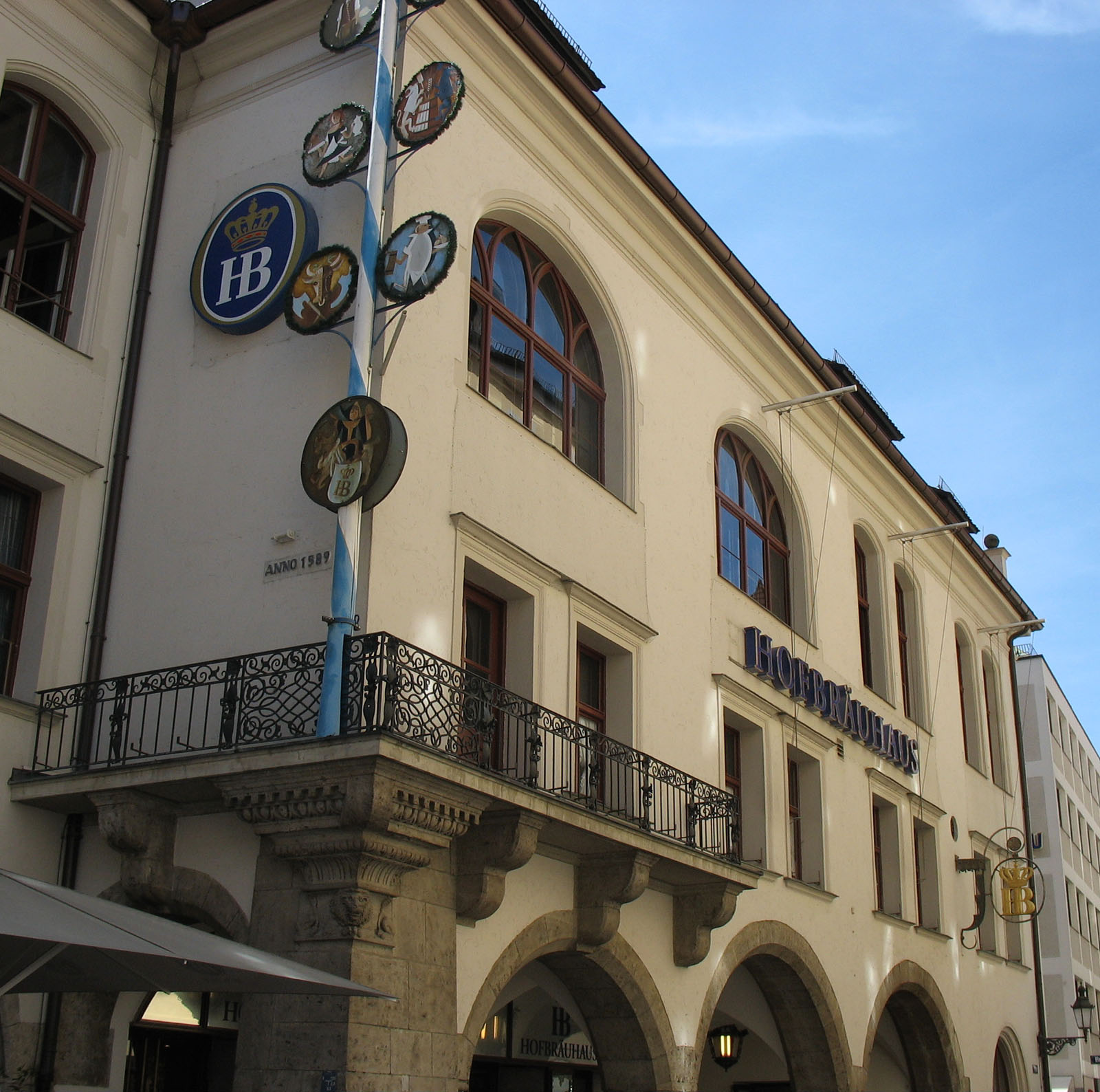 Information/Informationen Description/Beschreibung: The famous Hofbräuhaus in Munich, Das bekannte Hofbräuhaus in München Author/Autor: Jcg2006 Date/Aufnahmedatum: 15. Mai 2006; May 15, 2006 Source/Quelle: own work; selbst fotografiert